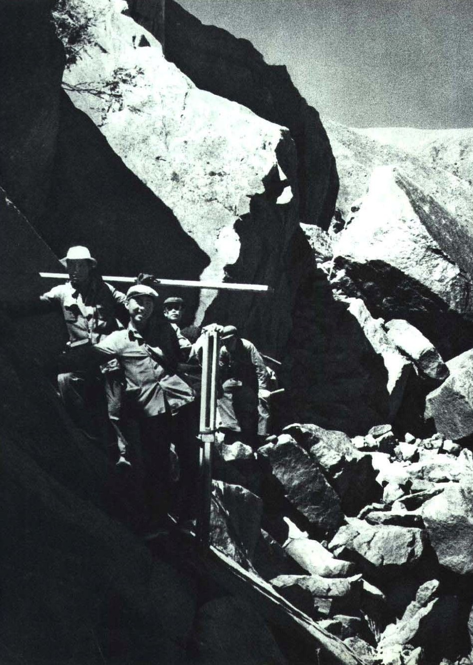 1964-07 1964年 中国科学院西藏综合考察队